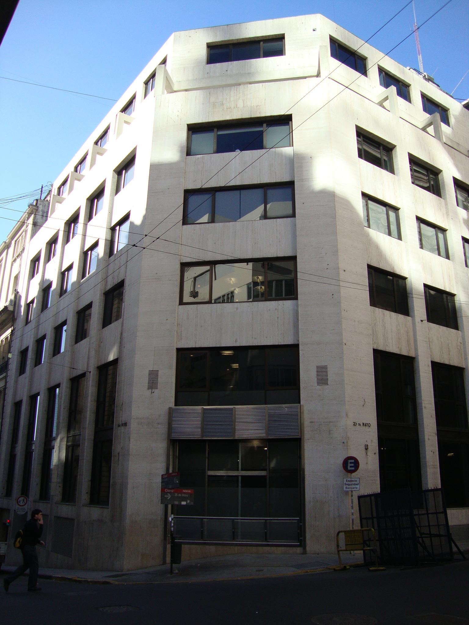 Edificio construido para el Banco Holandés Unido en 1935/1936. Obra del arquitecto Antonio U. Vilar y de Franz Meyer. Calle 25 de Mayo nº 81. Buenos Aires, Argentina.